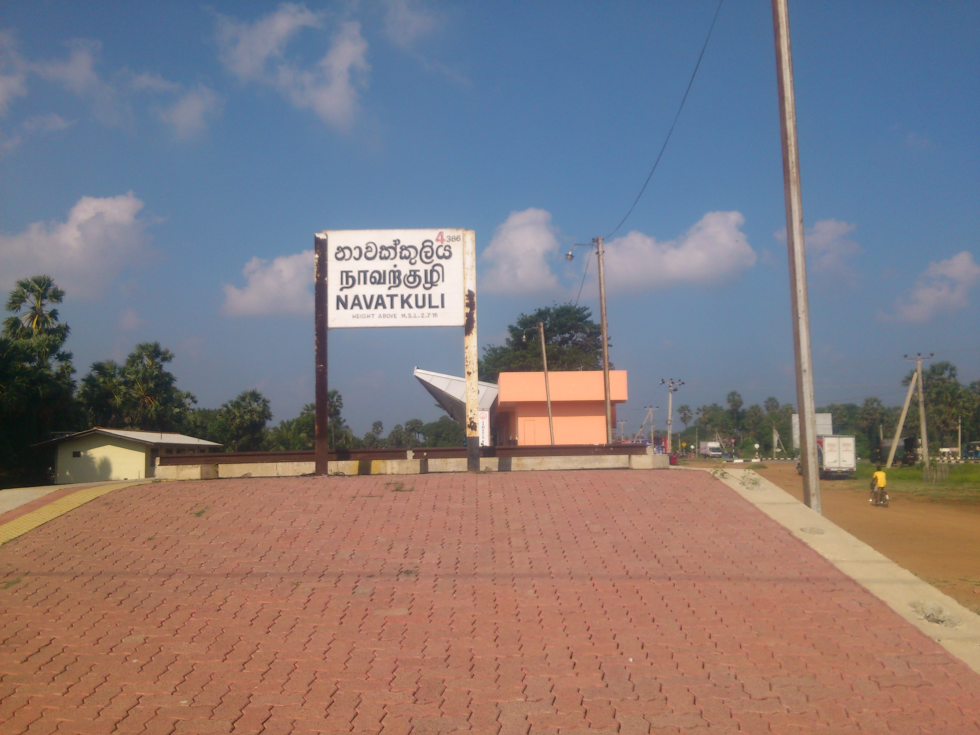 நாவற்குழி பெயர்பலகை